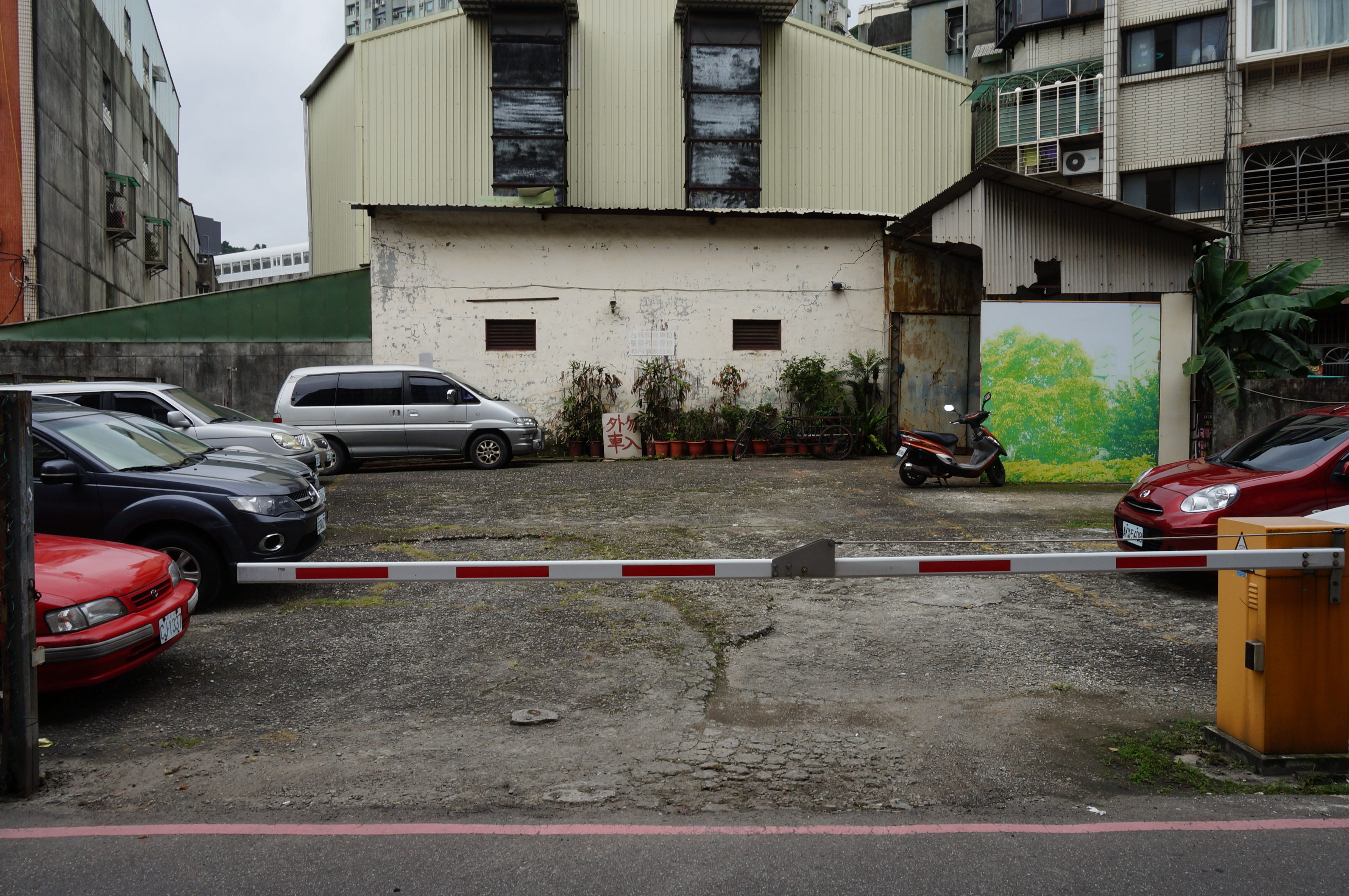 臺灣電視公司中和攝影棚戶外停車場，位於新北市中和區大智街。